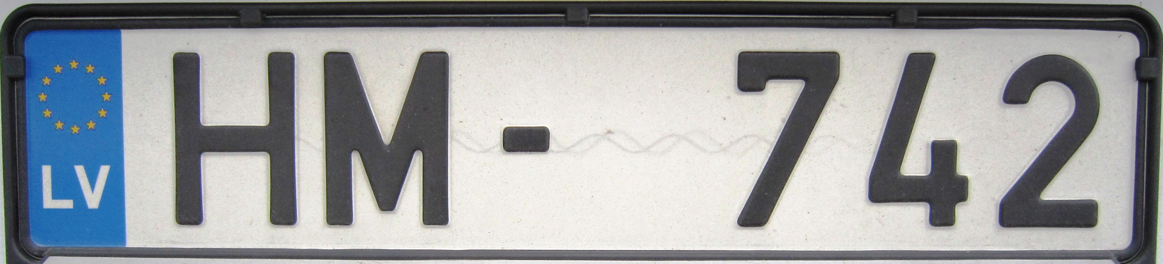 Letland kenteken EU